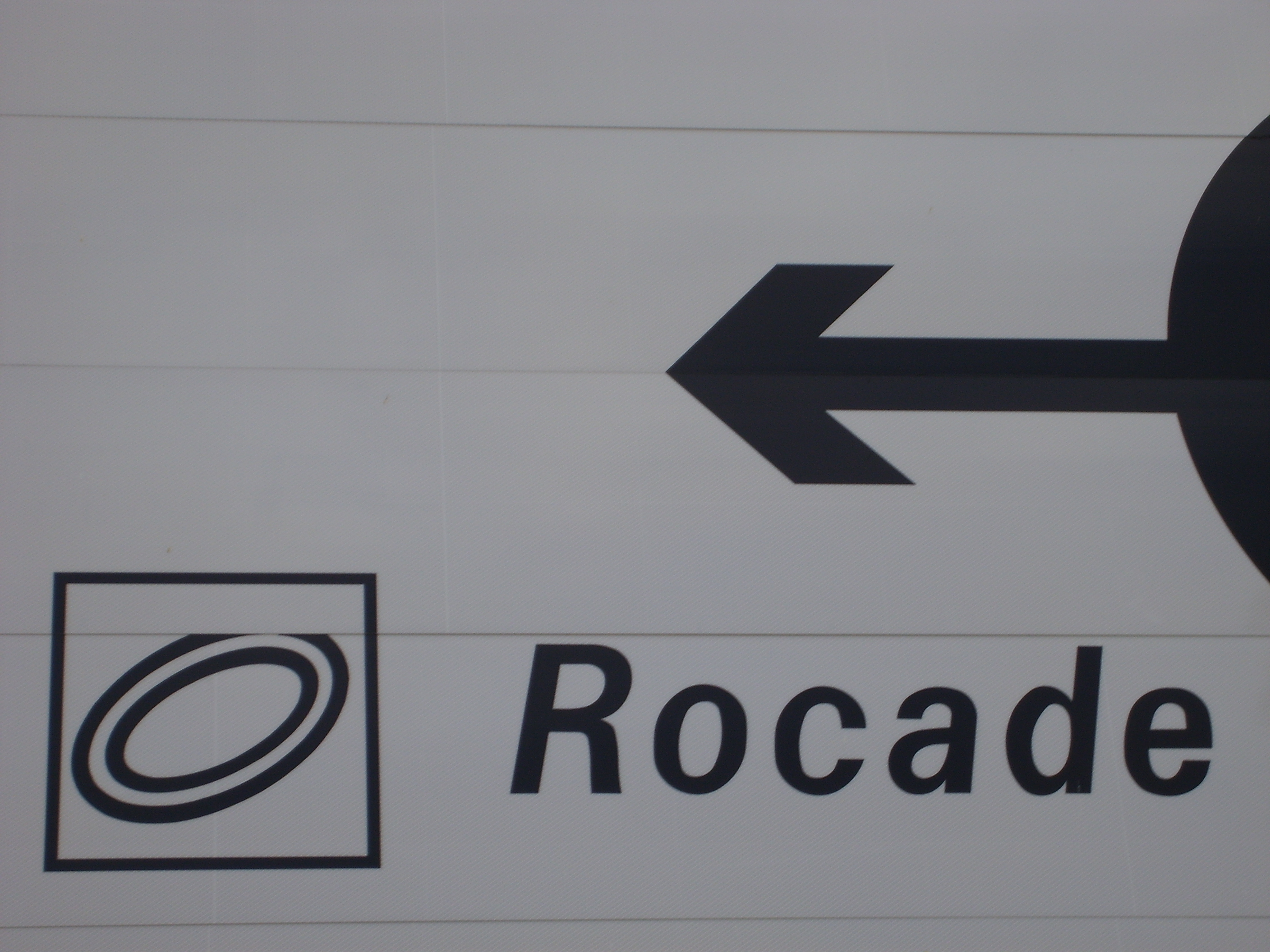 panneau signalisation rocade bordeaux